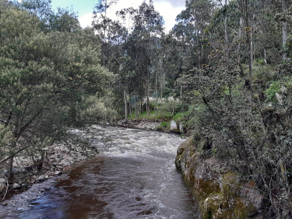 El rio Ynuncay parte del biocorredor